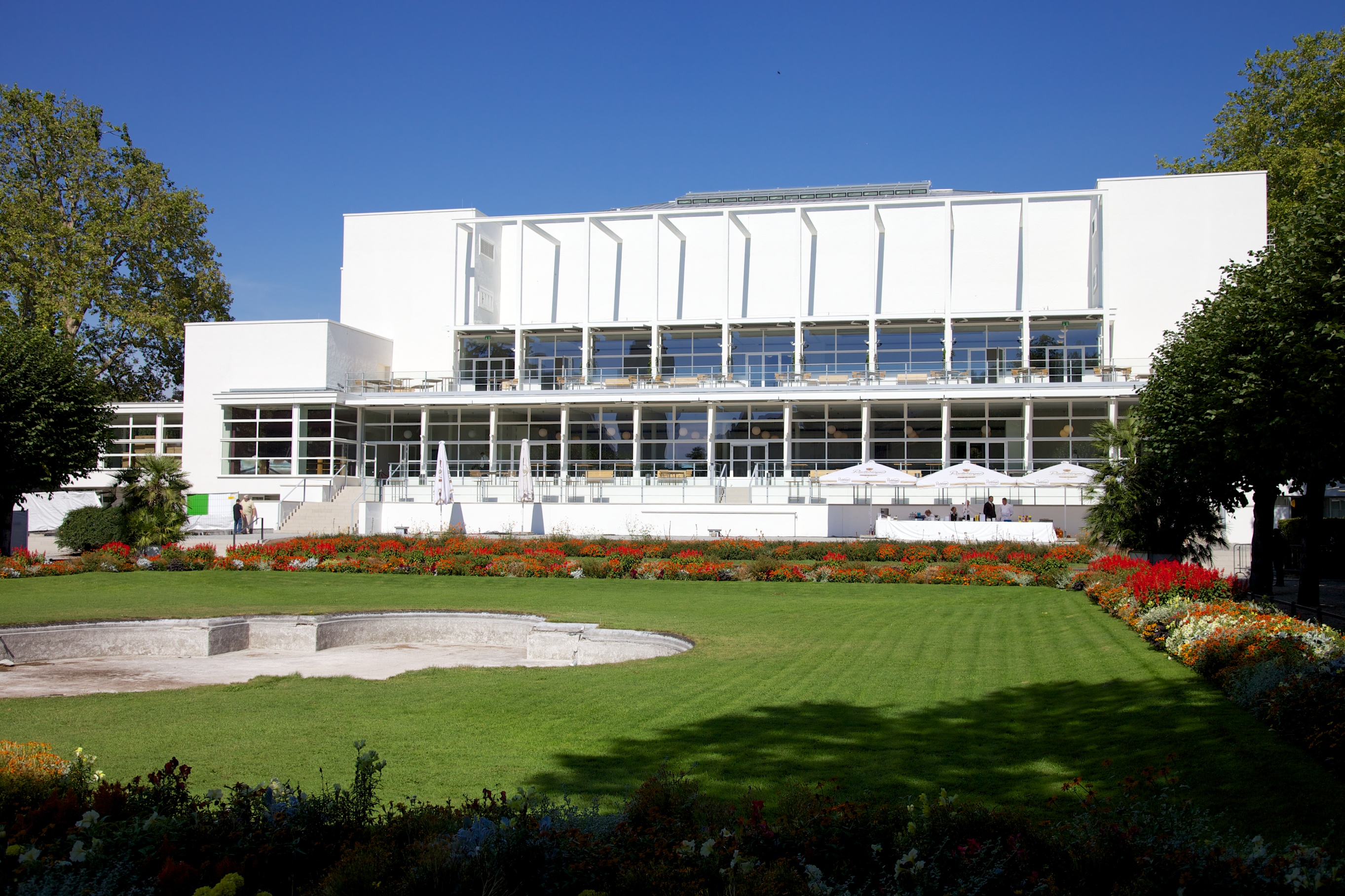 Gesellschaftshaus des Palmengartens Frankfurt am Main im September 2012